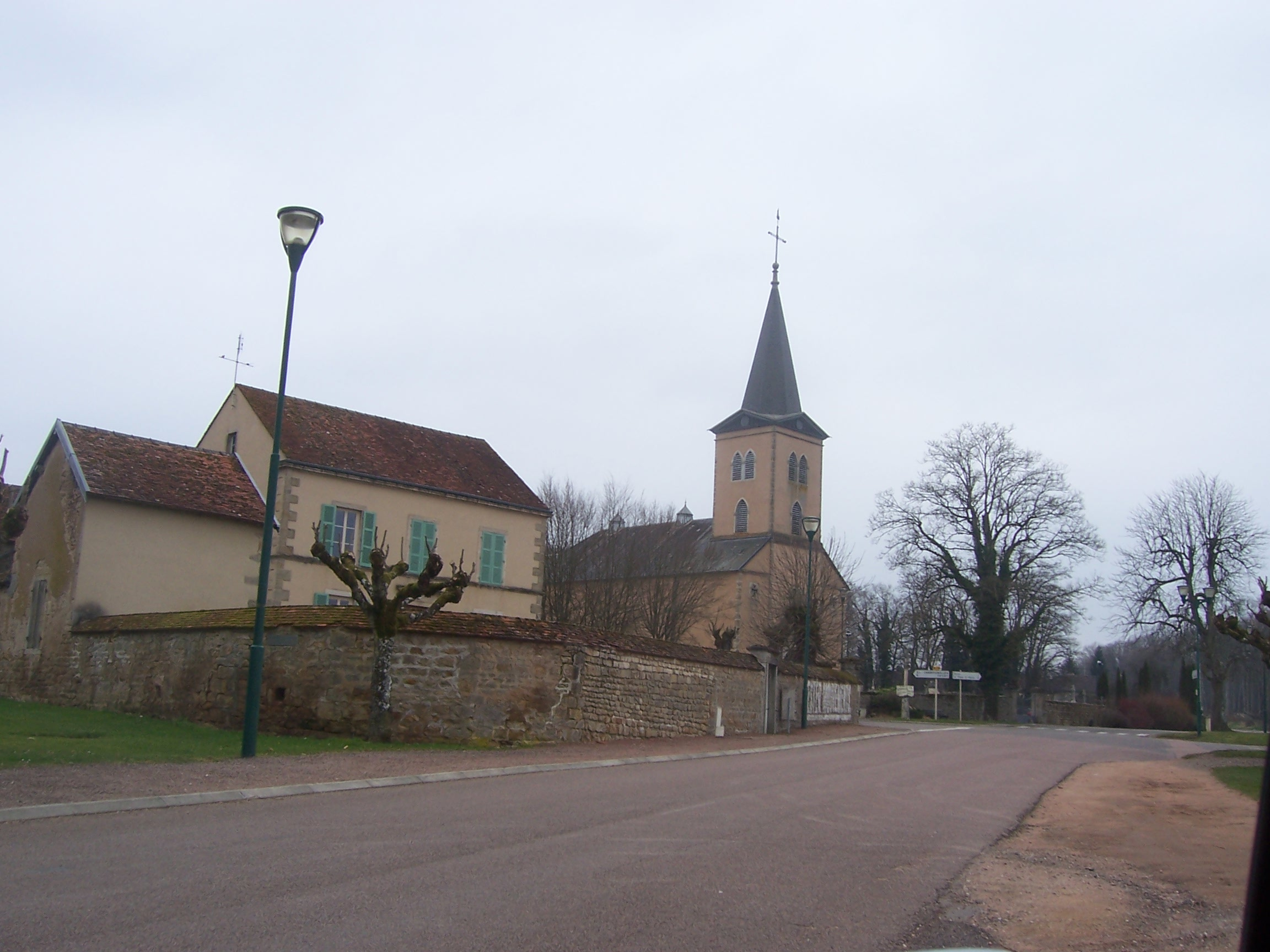 Eglise de Lacanche